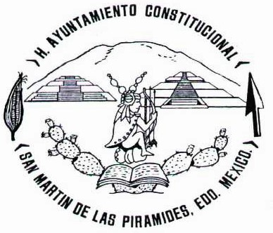 San Martín de las Pirámides, “Pueblo con Encanto del Bicentenarios”